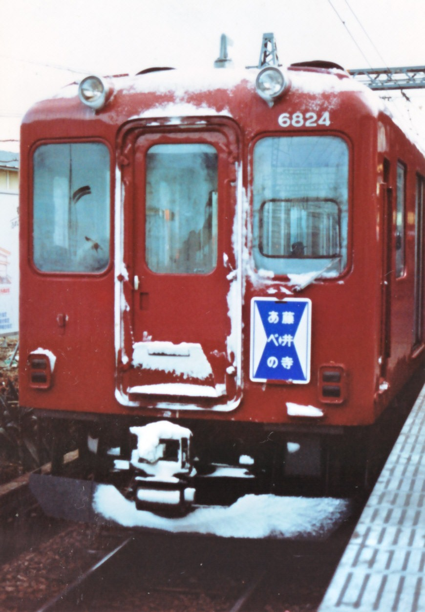 近鉄南大阪線６８００系「ラビットカー」 後期車ではライト間隔が広がった